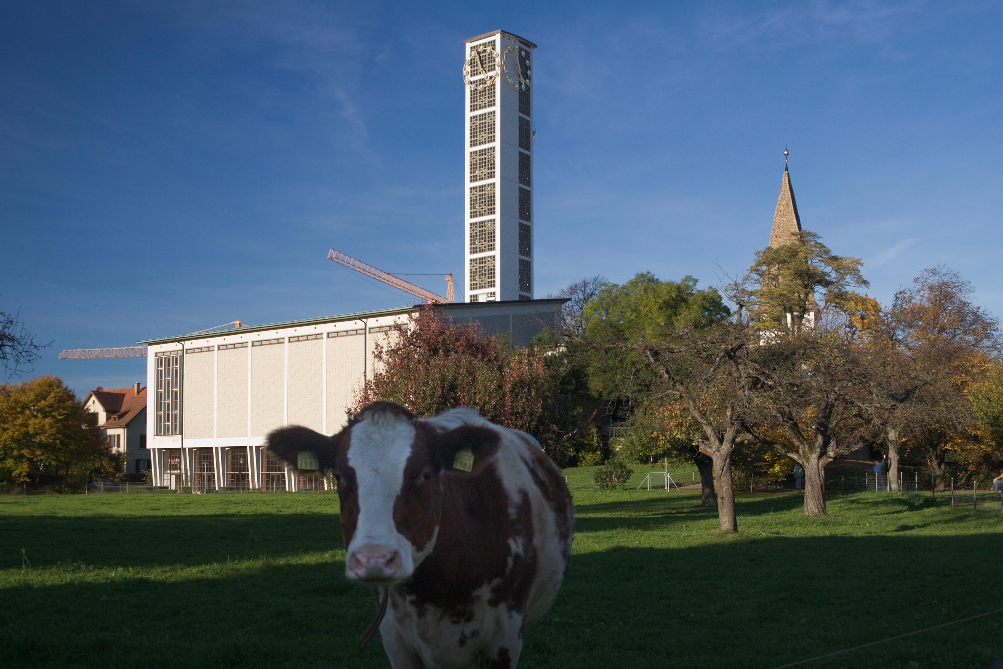 Die Alte und die neue Grosse Kirche von Altstetten, heute Stadt Zürich, Schweiz. Die Grosse Kirche ist von Werner Max Moser erbaut worden.